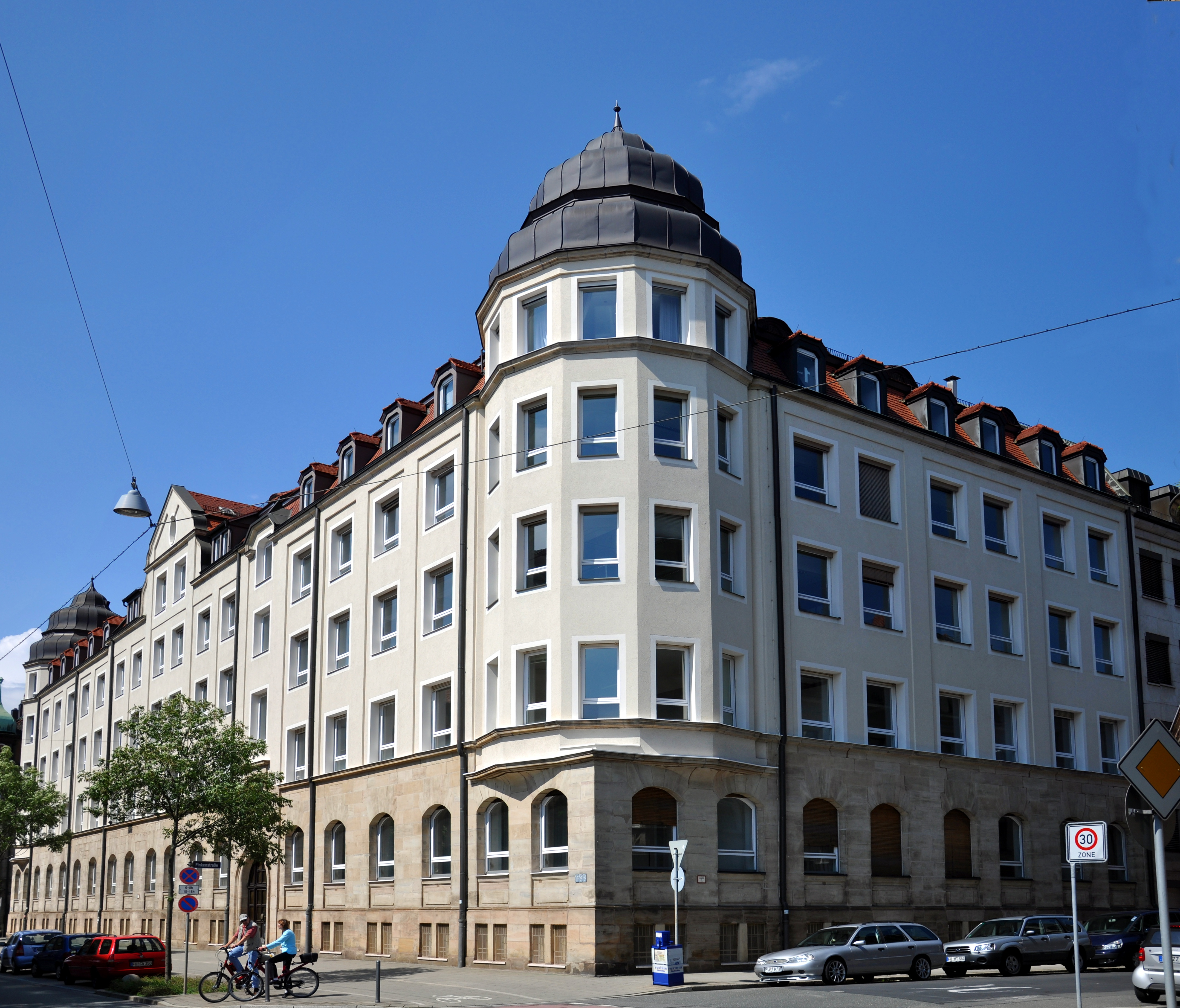 Ehemalige Quellehauptverwaltung, heutige Zweigstelle des Bayerischen Landesamtes für Statistik und Datenverarbeitung in Fürth, Ecke Nürnberger Straße/Finkenstraße